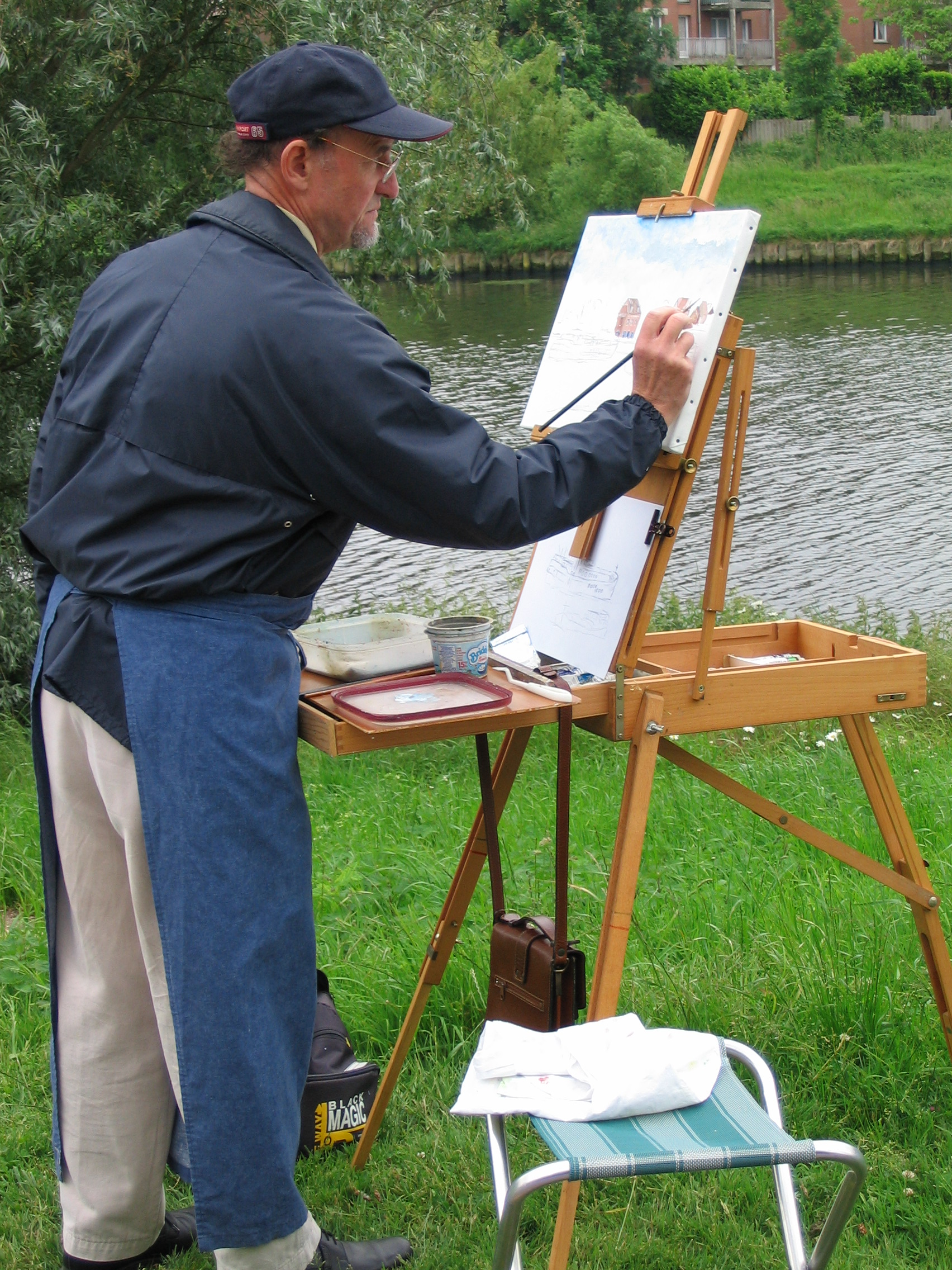 Amateur peignant une toile lors de la Fête de l'eau 2005 à Quesnoy-sur-Deûle (Nord), s'inspirant du canal en arrière-plan.